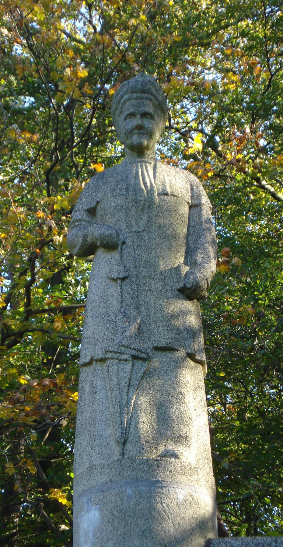 Baarn, Gerrit van der Veenlaan. Monument Koningin Emma van Gerrit van der Veen. Baarn/The Netherlands. FOP.